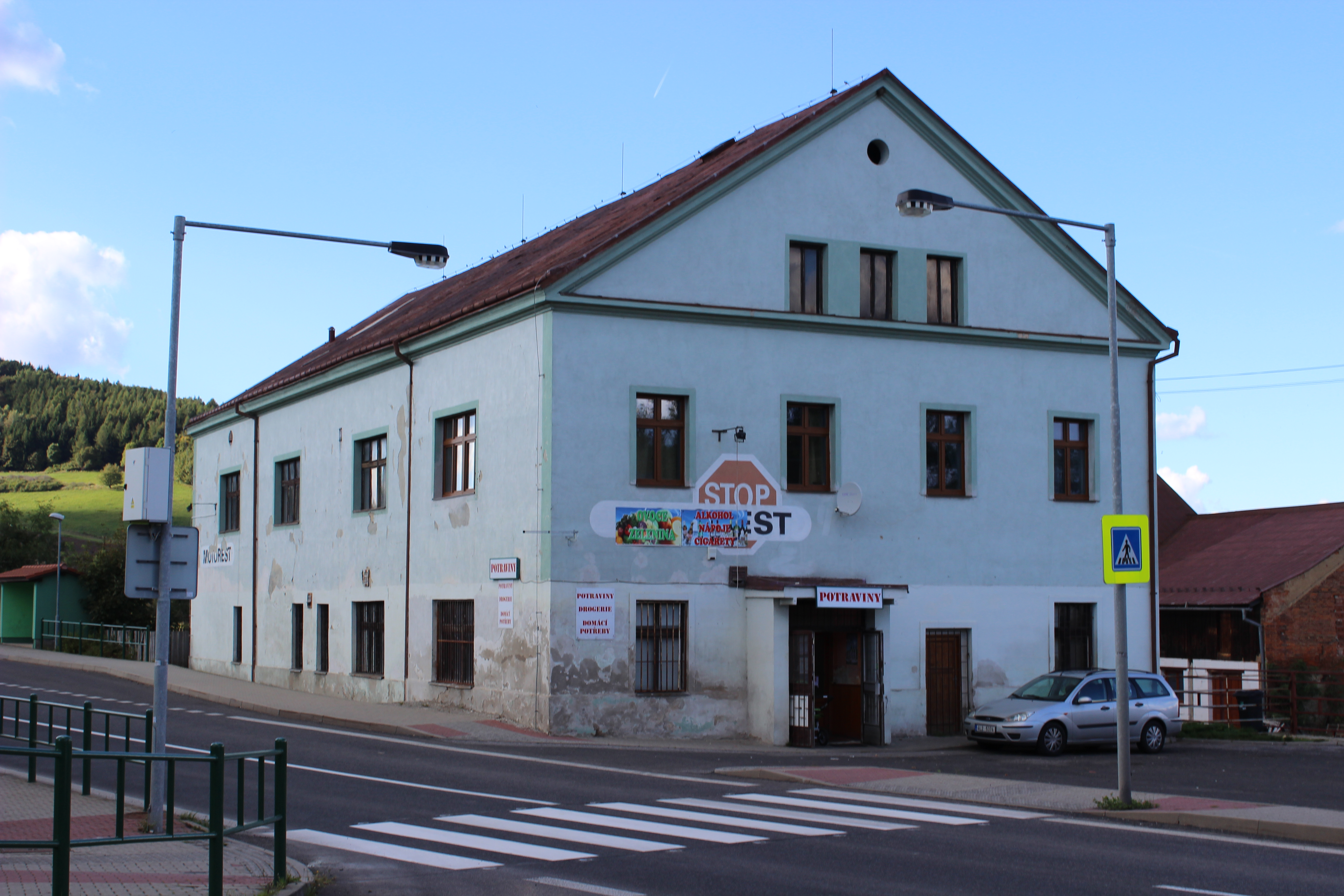 Dům číslo popisné 1 v Huntířově.